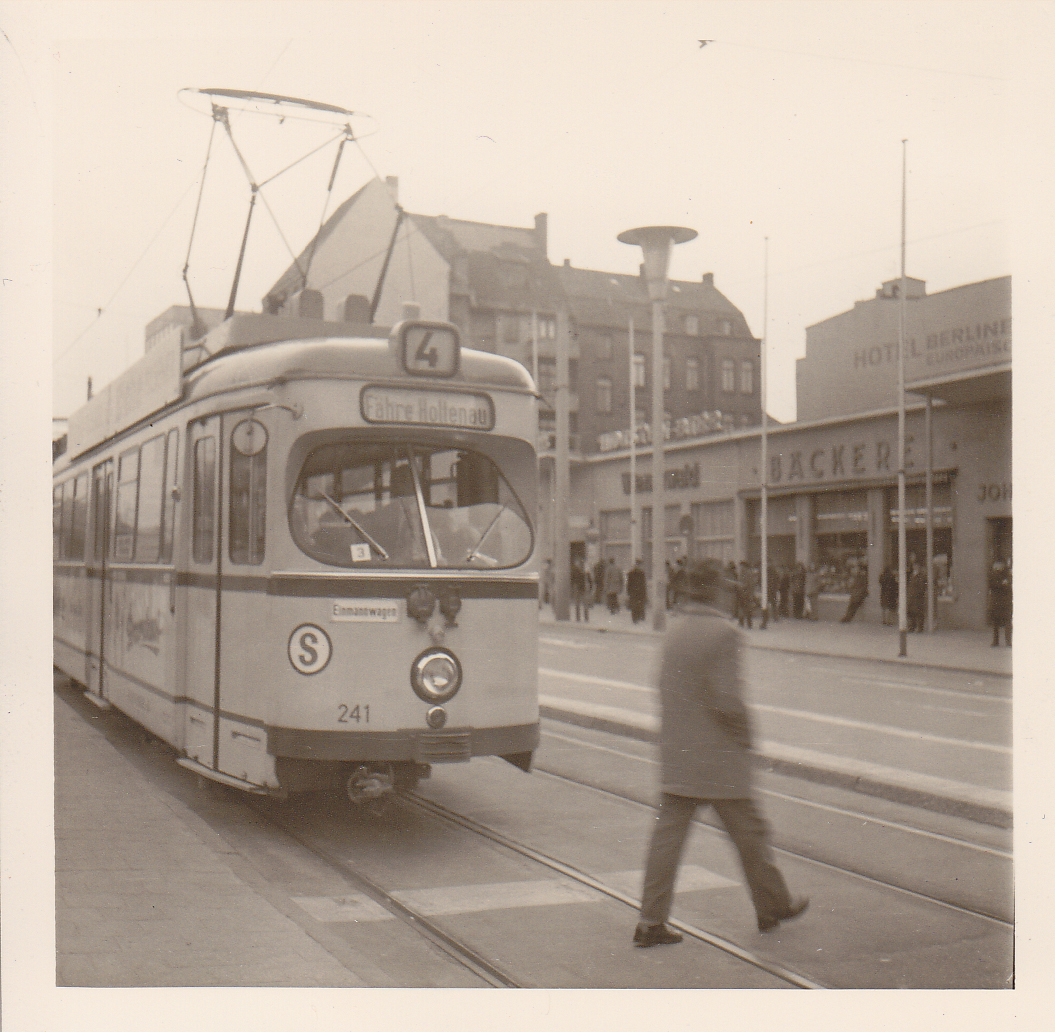 DÜWAG-Triebwagen Nr. 241 der Kieler Straßenbahn im März 1974.